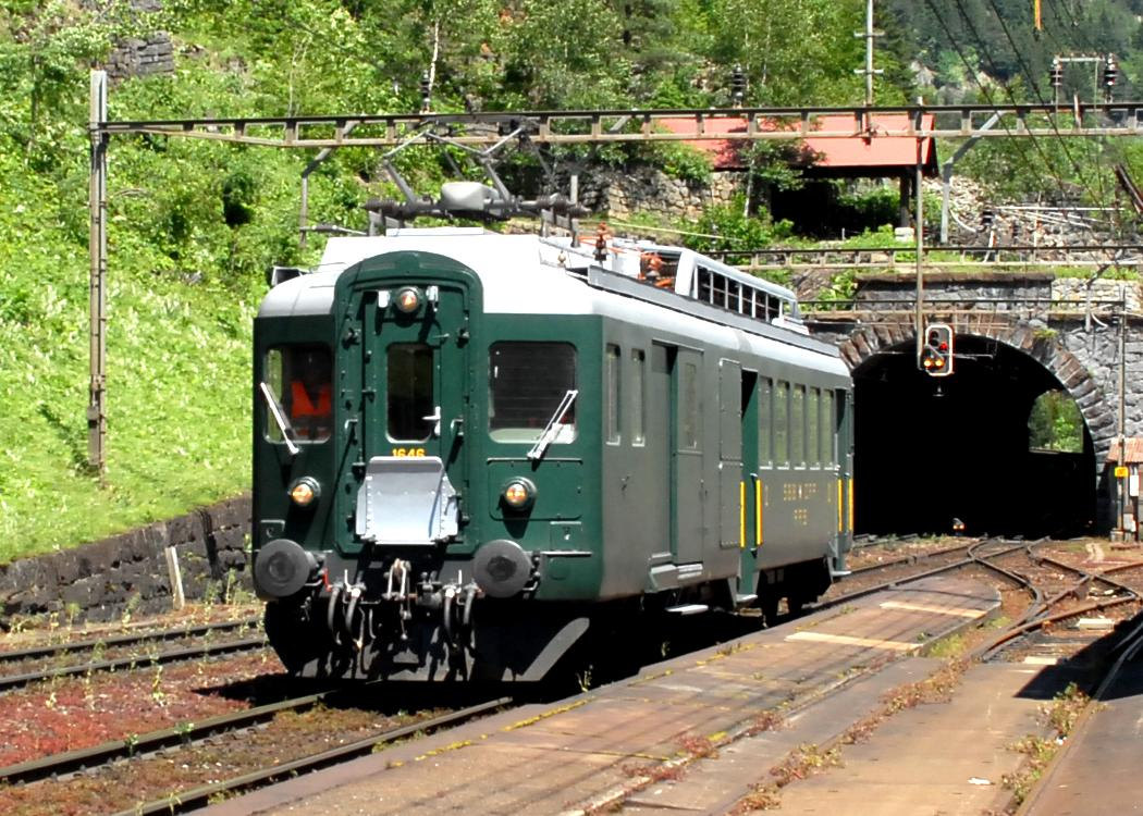 SBB BDe 4/4 1646 in Wassen (Bildausschnitt des Orginalbilds)